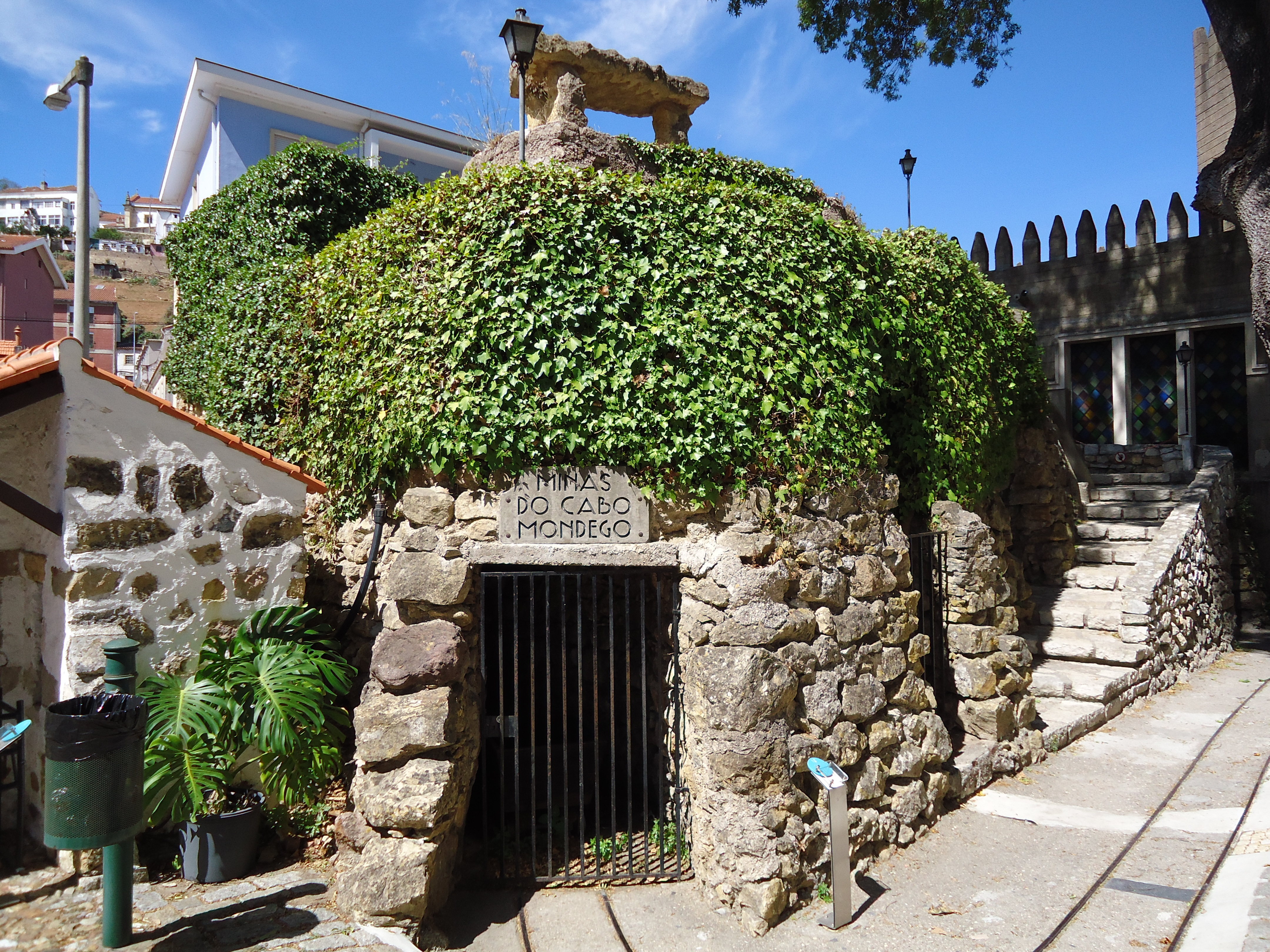 Portugal dos Pequenitos, Coimbra, Portugal: área das Casas Regionais (homenagem às Minas do Cabo Mondego).